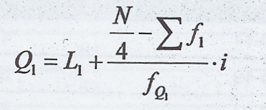 prv_kvartil_2011.jpg